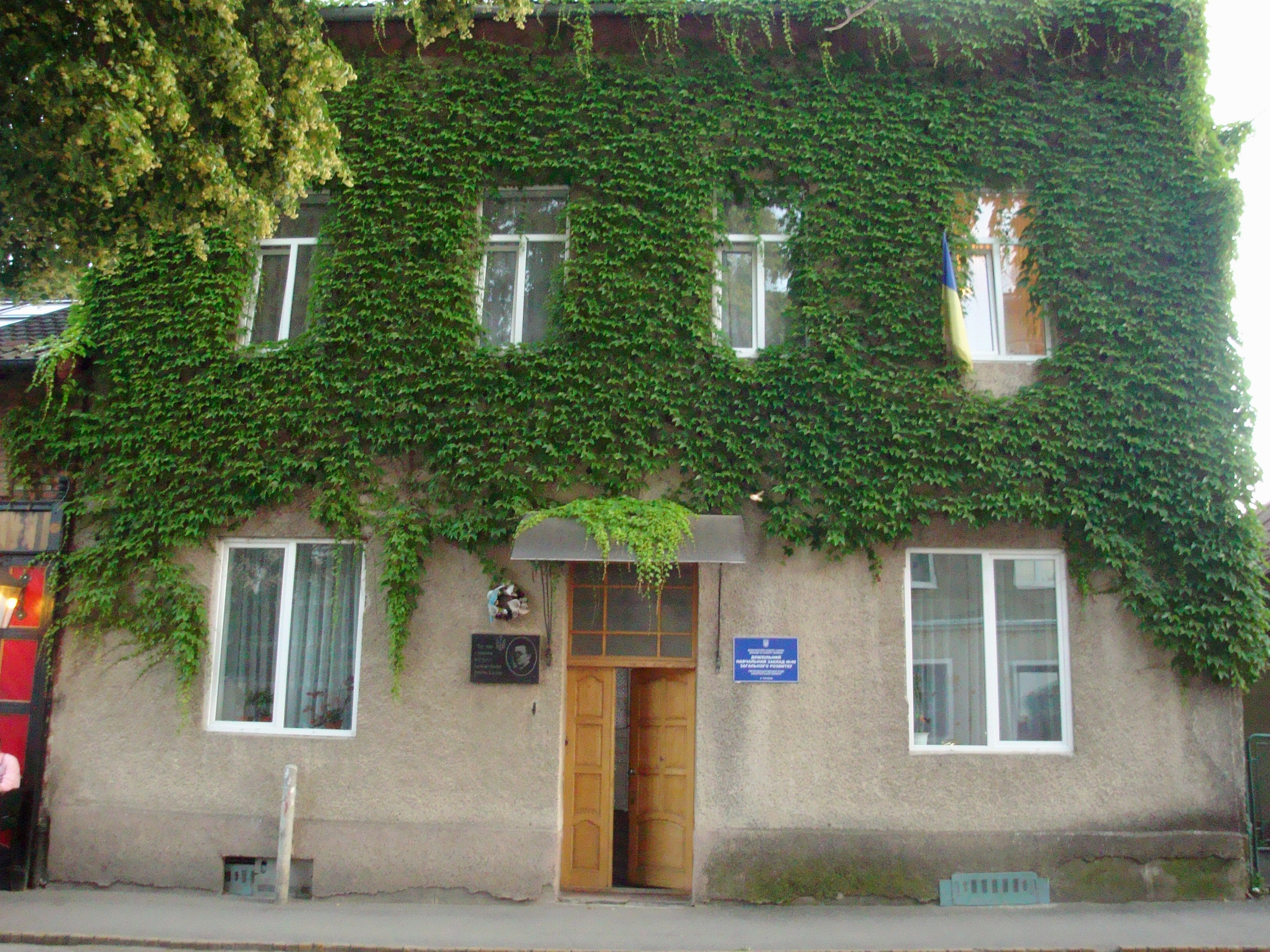 Будинок, в якому жив і працював Закарпатський культурний і політичний діяч А.Волошин, Ужгород, вул. Волошина, 36